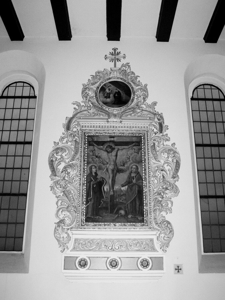 Obraz w kościele - Stary Dwór - g. Trzciel - woj. lubuskie - Poland